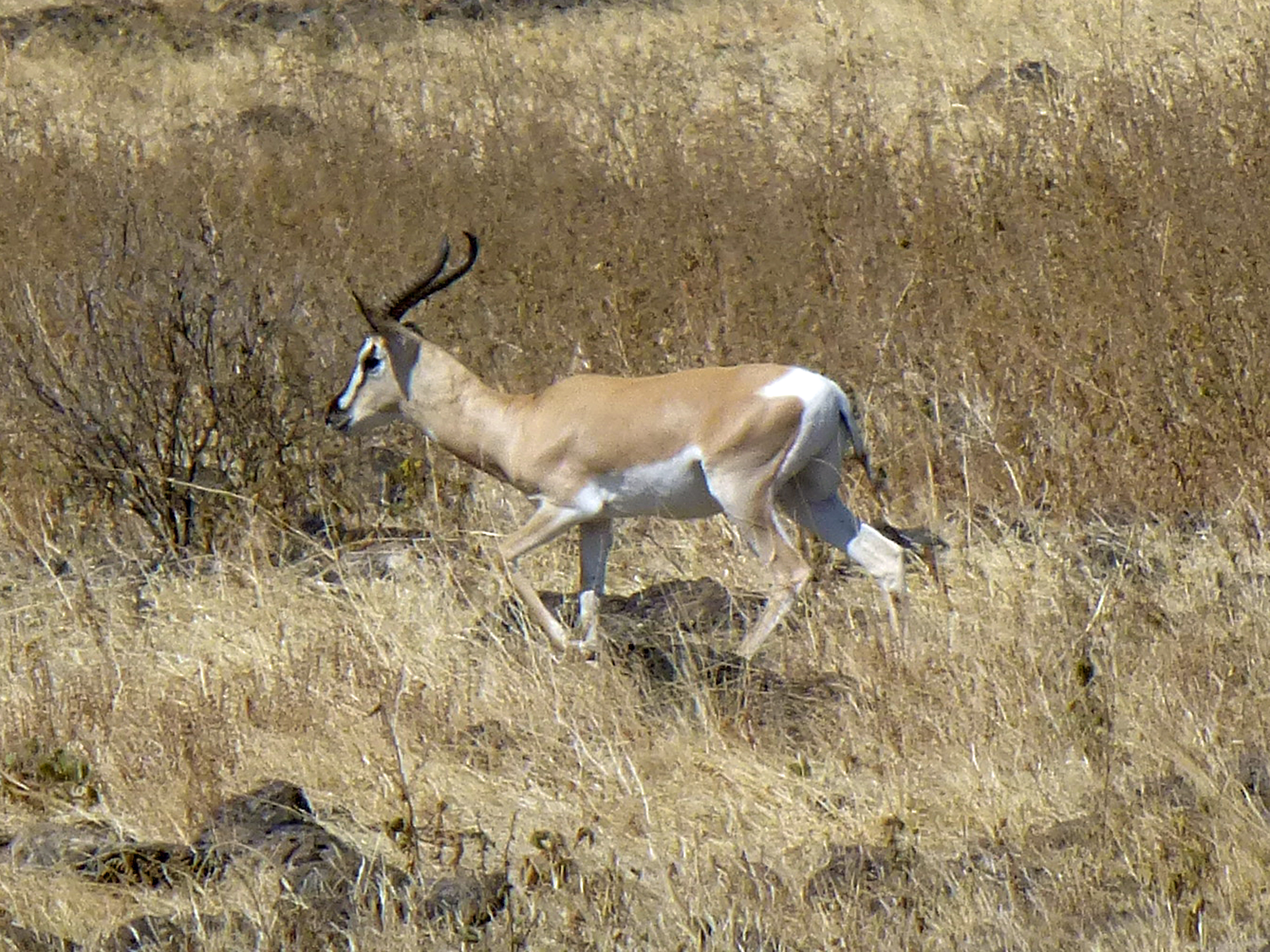 Gazelle de Soemmerring au Parc national de Yangudi Rassa (Ethiopie)